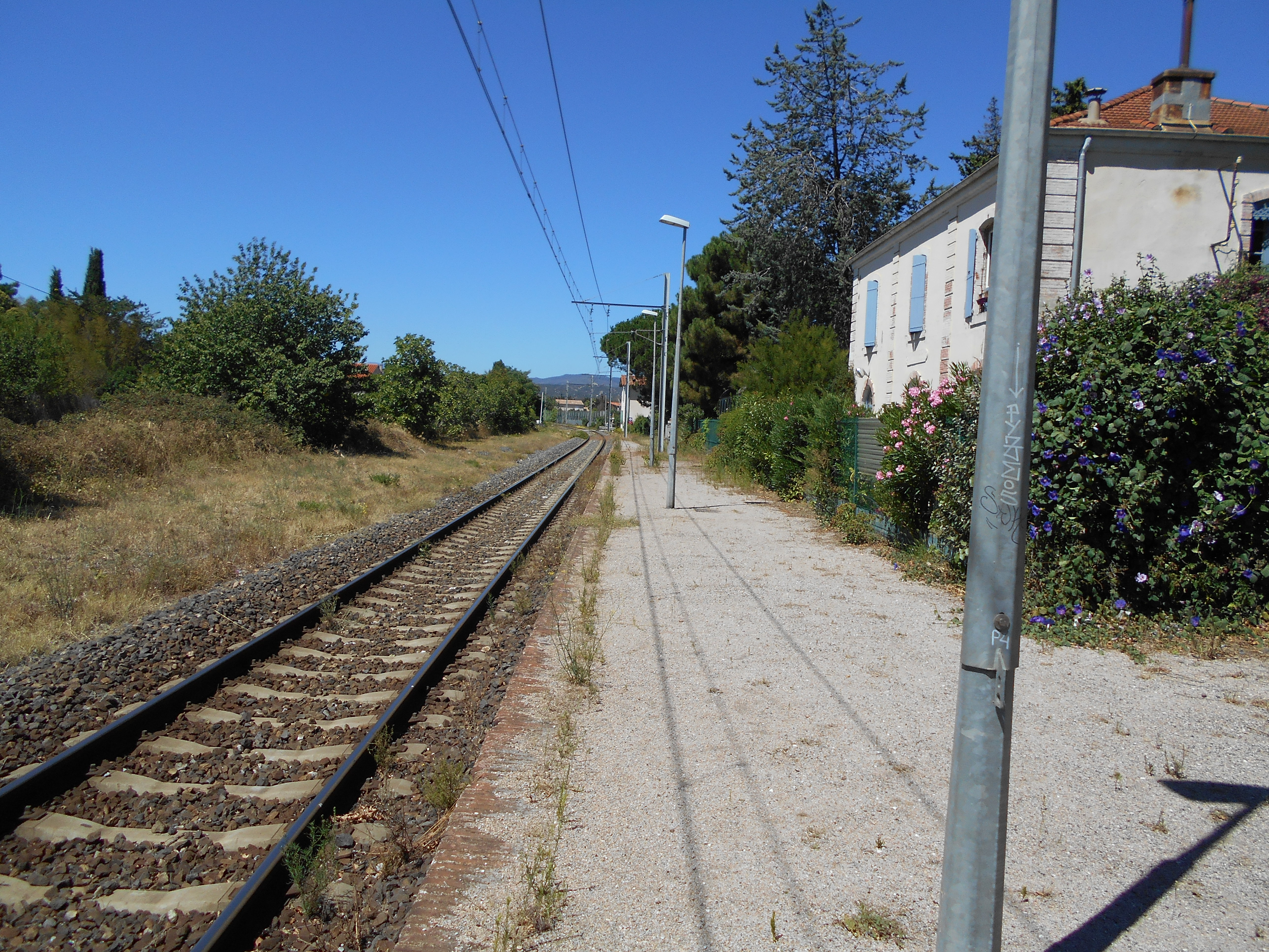 L'Estació de Millars